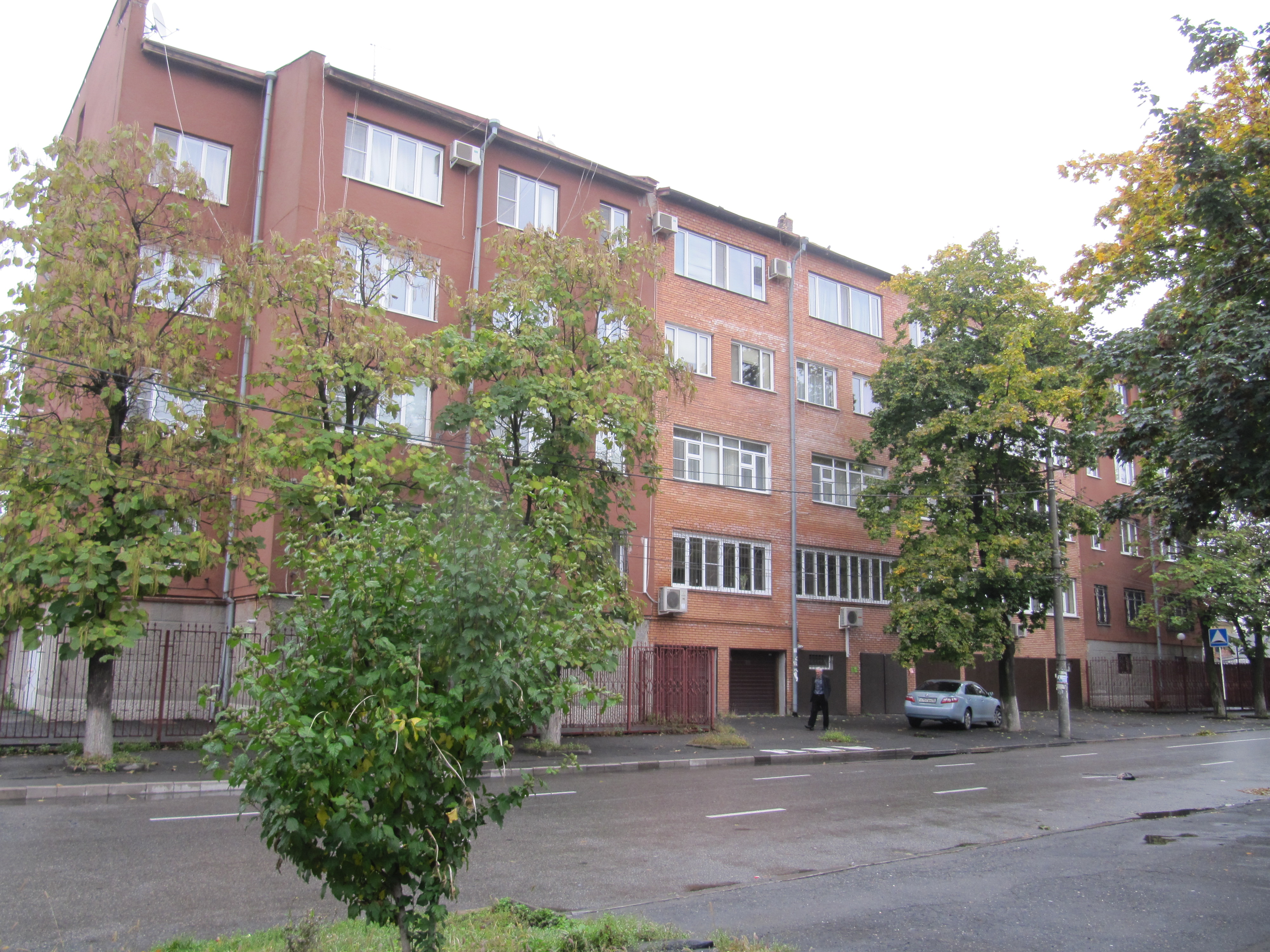 Дом №24 на улице Карла Маркса, Владикавказ